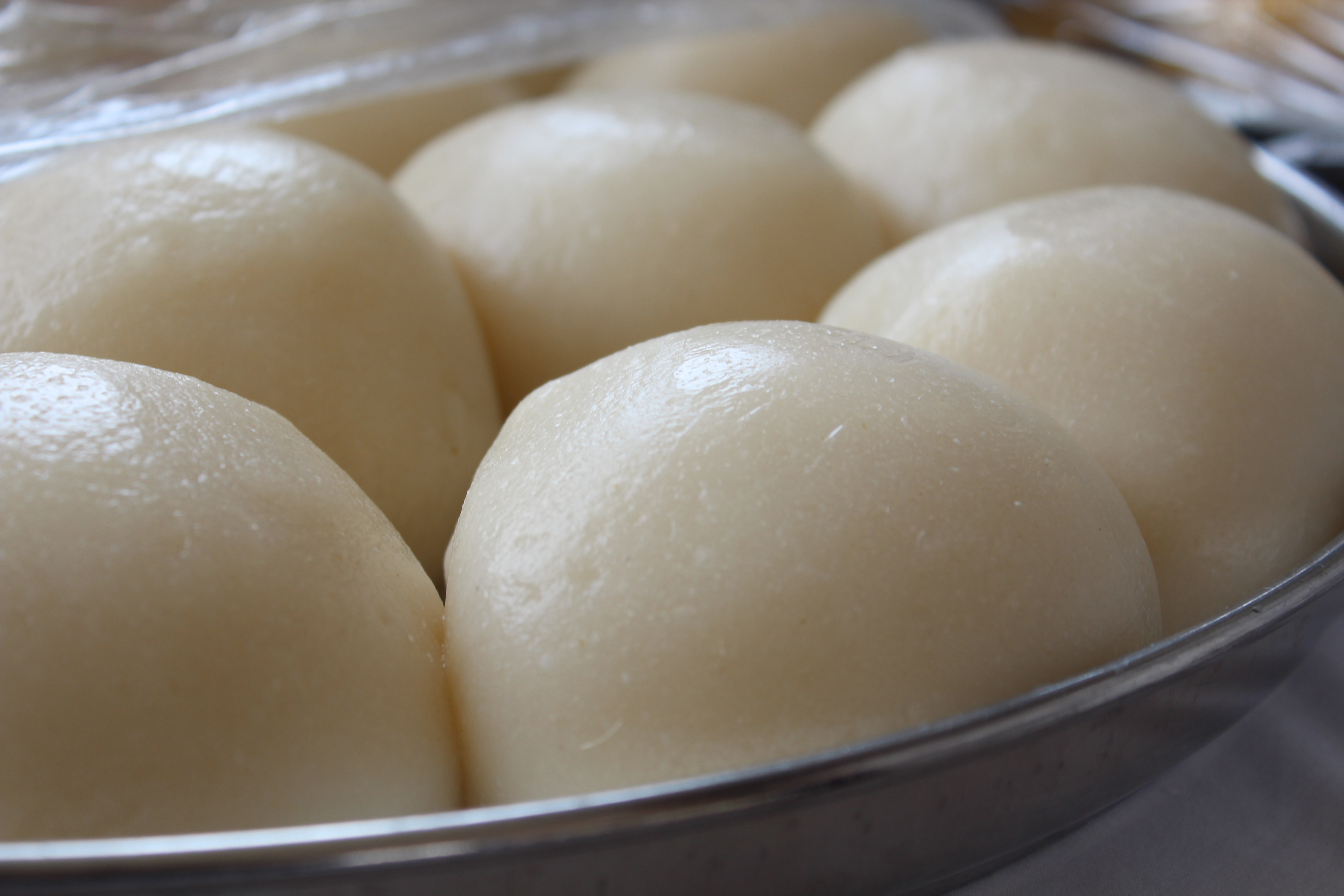 Du placali ( pâte de manioc fermentée) à déguster avec de la sauce gombo par exemple This is an image of food from Côte d'Ivoire